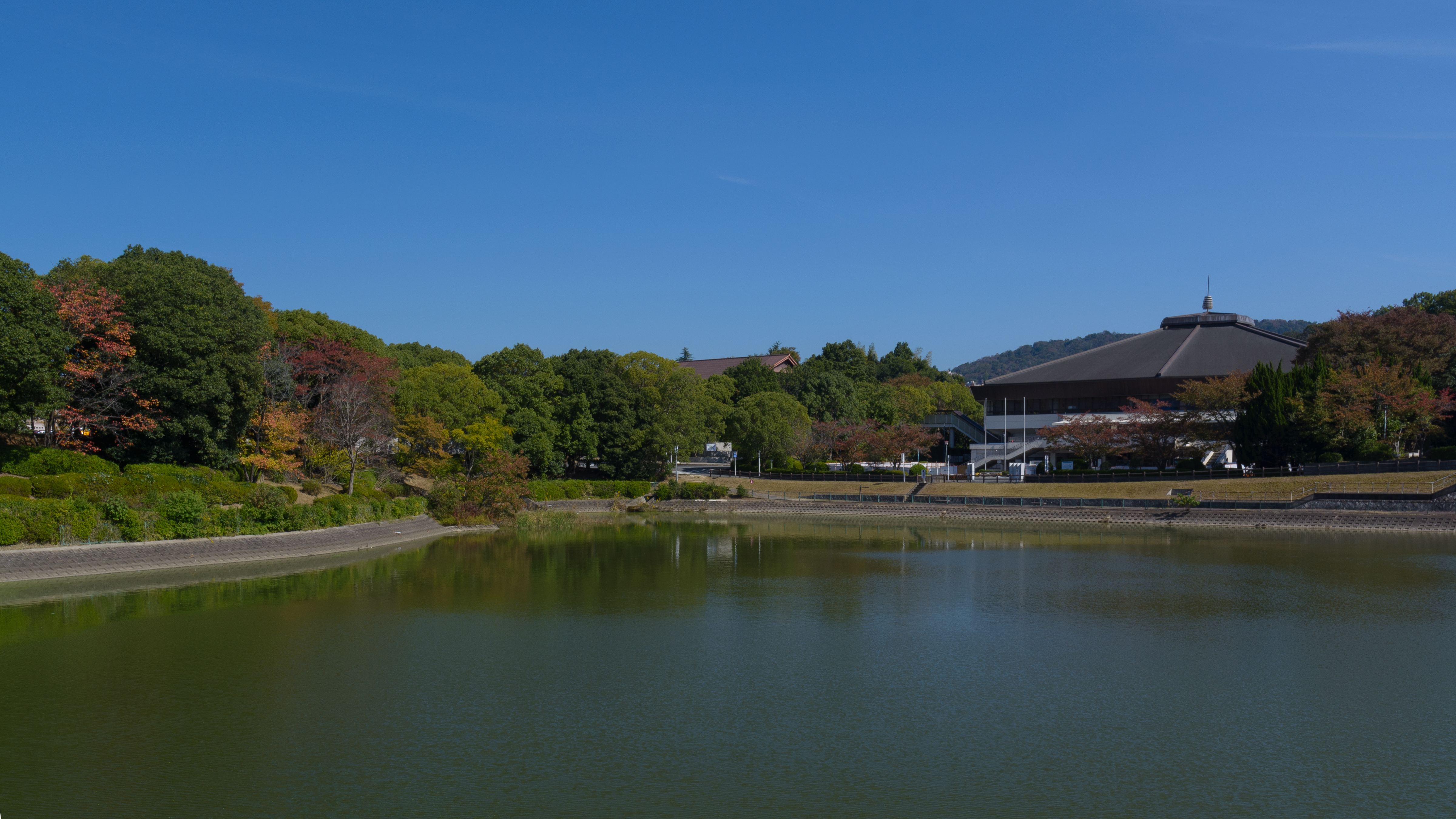 鴻池（奈良市法蓮佐保山4丁目）と右奥に見える建物は奈良市中央体育館。池の周辺には鴻ノ池運動公園が広がり、体育館のほかに奈良市鴻ノ池陸上競技場、奈良市鴻ノ池球場などが建つ。